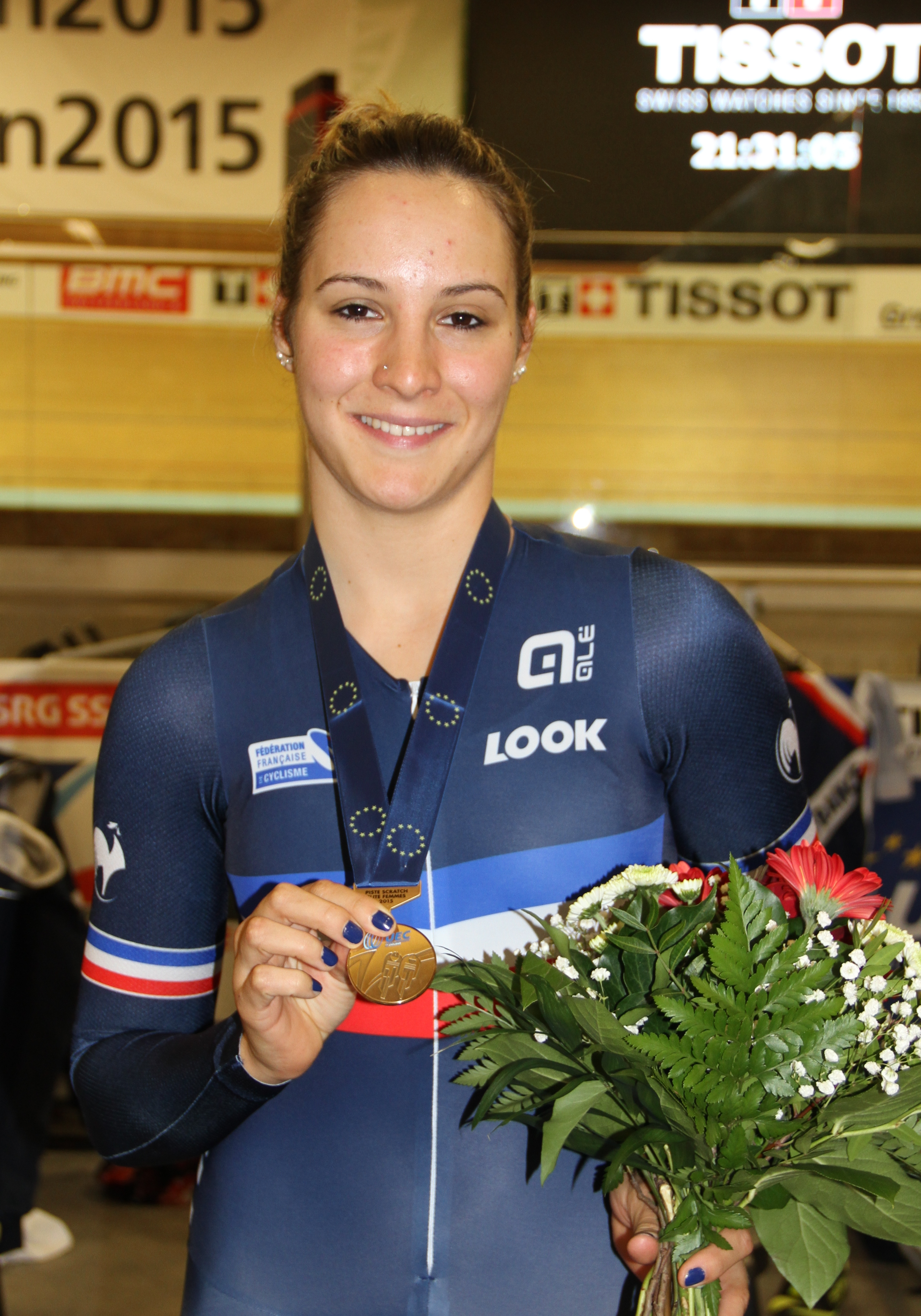 Roxane Fournier, franz. Radsportlerin, Bronze im Scratch The making of this document was supported by the Community-Budget of Wikimedia Germany.